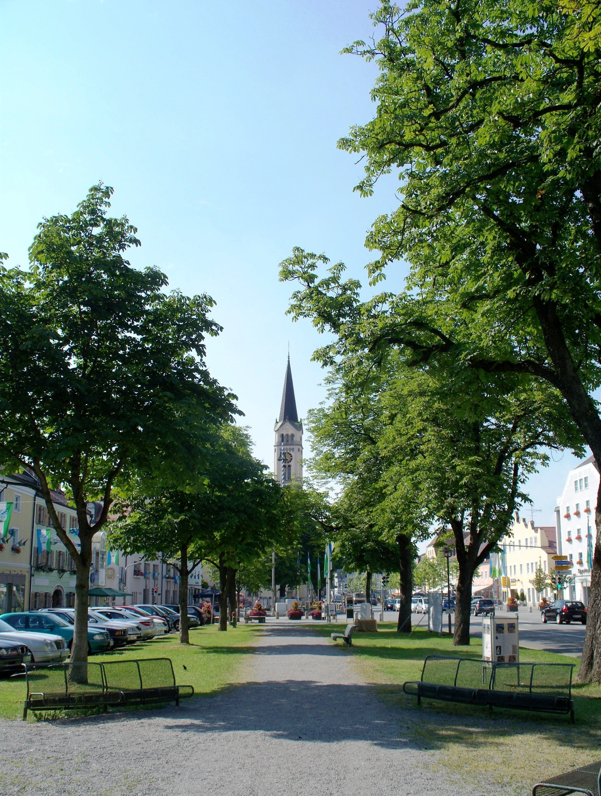 Der Stadtplatz von Plattling.